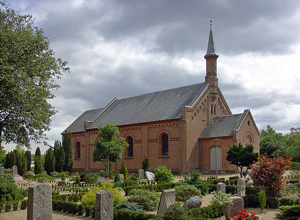 fra nordvest